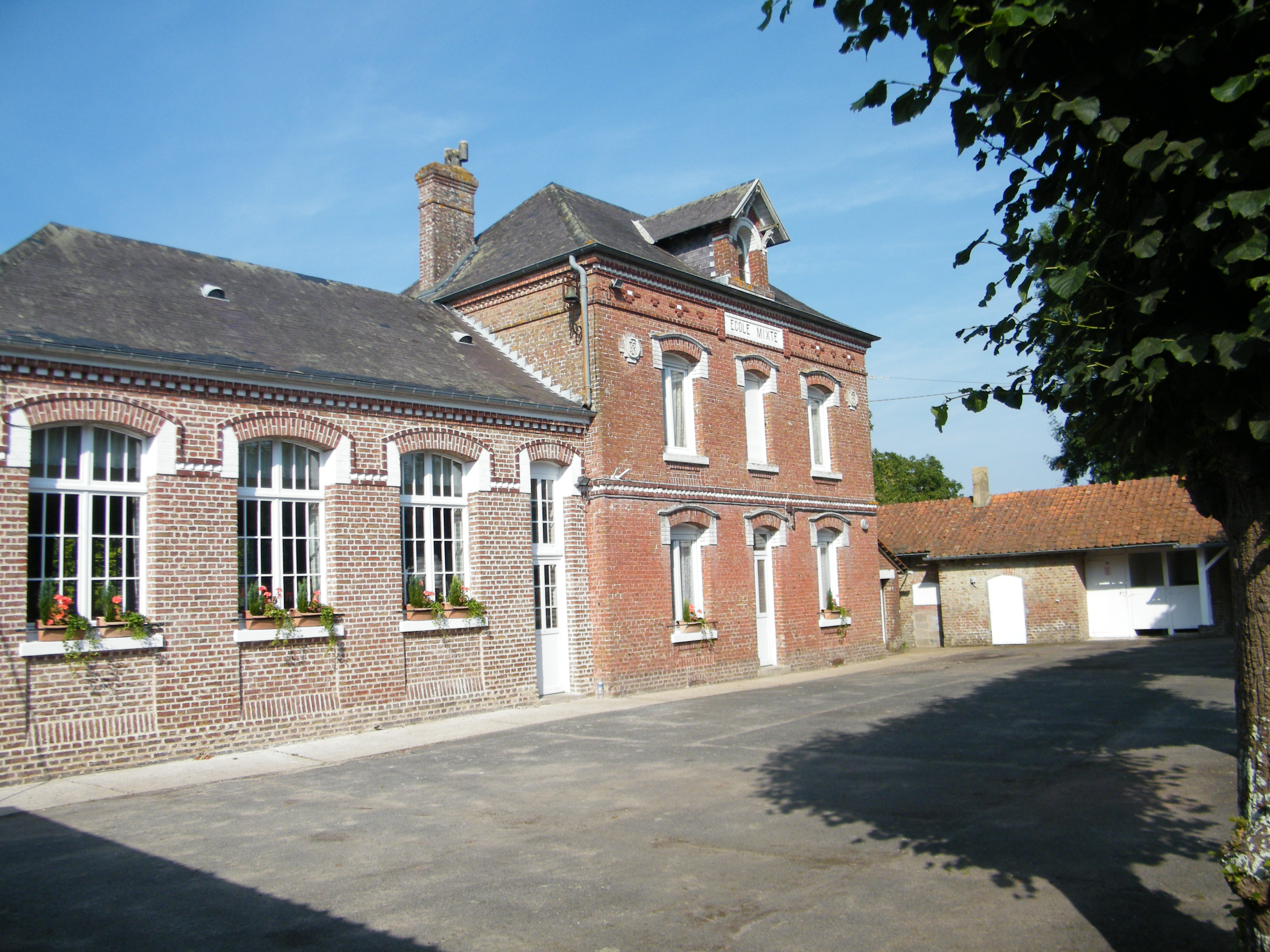 école.